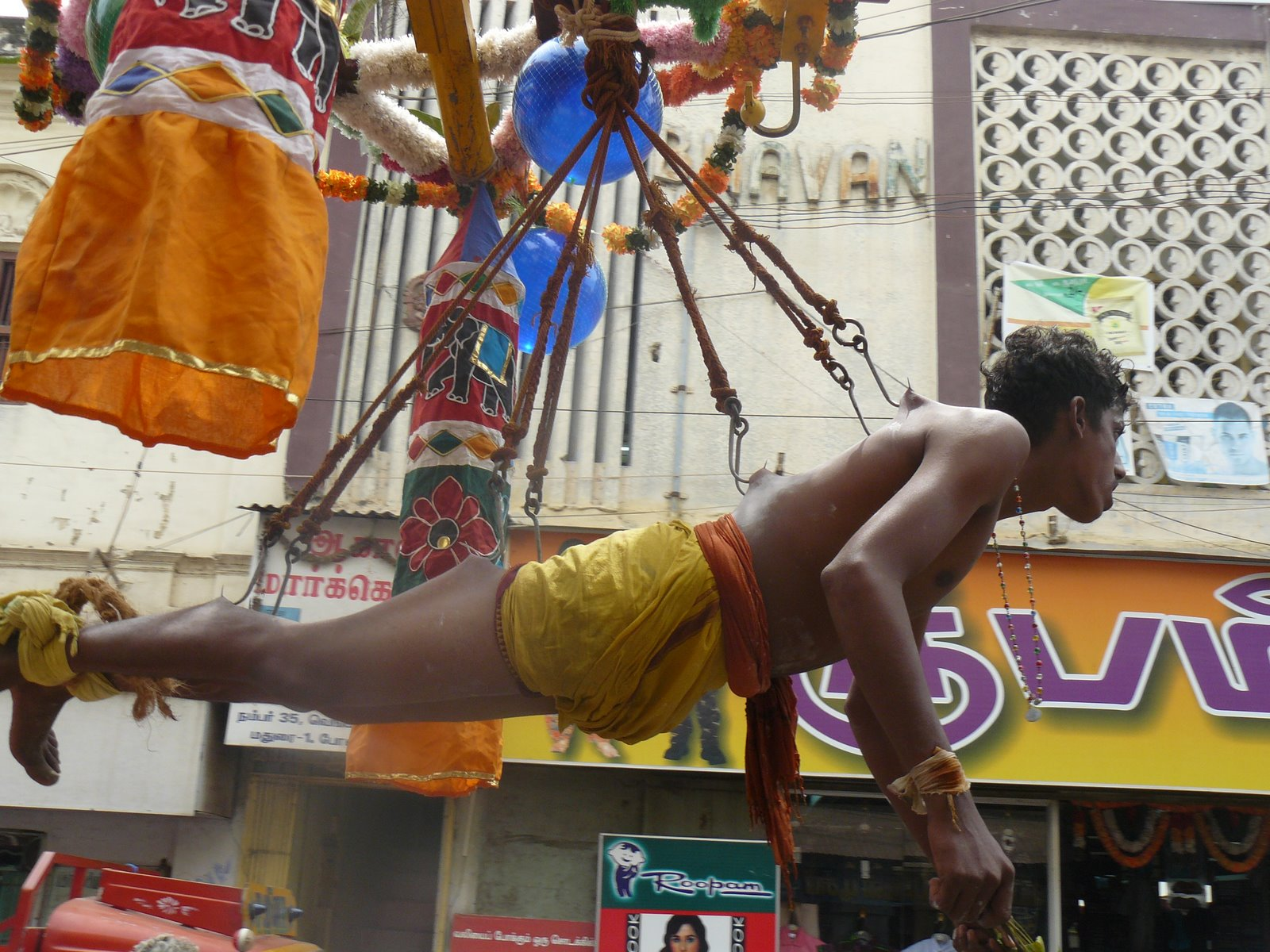 தன் உடல் முழுவதும் கூரிய கொக்கிகளால் துளைத்துக் கொண்டு தான் அந்தரத்தில் தொங்கியபடி தன்னையும் தன்னுணர்வையும் இறைவனுக்கு அர்ப்பணிக்கும் பண்பு தமிழகப் பக்தி மரபில் சங்க காலம் தொட்டு நிகழ்ந்து வருகிறது. அத்தகைய பக்தியை விளக்கும் ஓர் அரிய படம்.